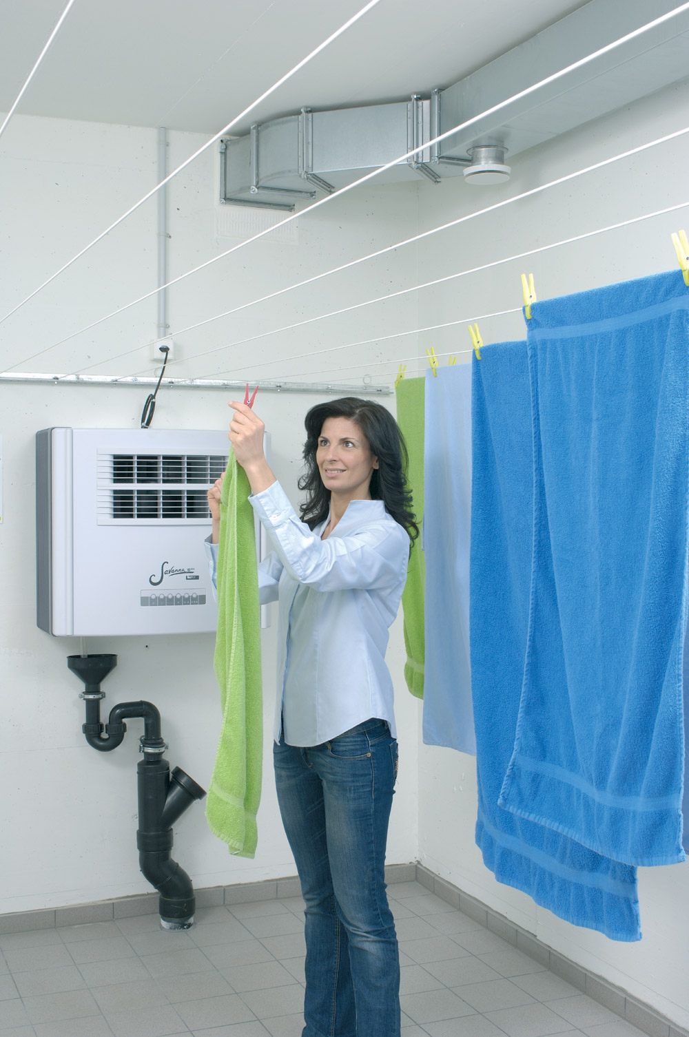 An Wäscheleinen aufgehängte Wäsche wird vom Raumluft-Wäschetrockner getrocknet.